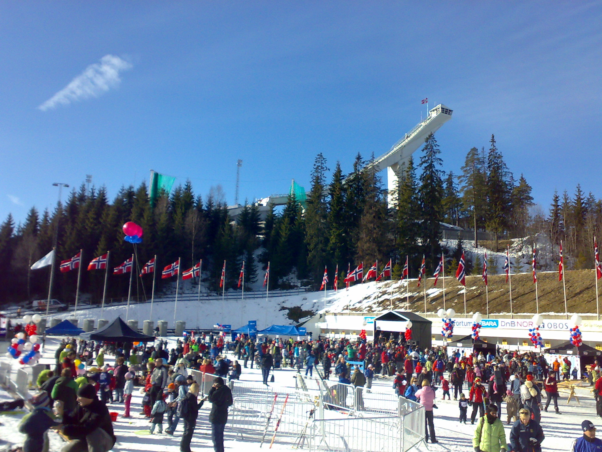 barnas Holmenkolldag 2008